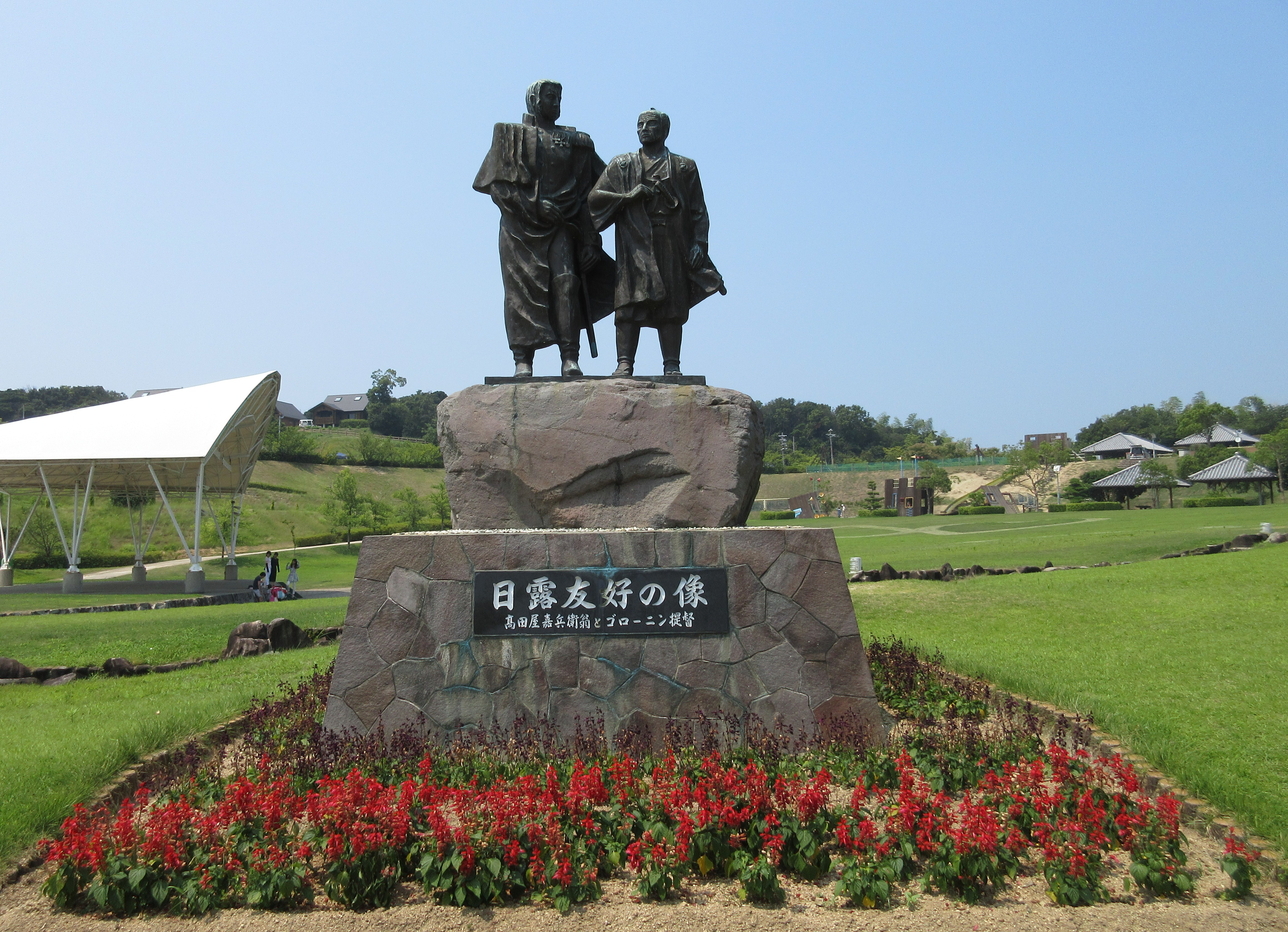 ウェルネスパーク五色にある日露友好の碑 (高田屋嘉兵衛とゴローニン)